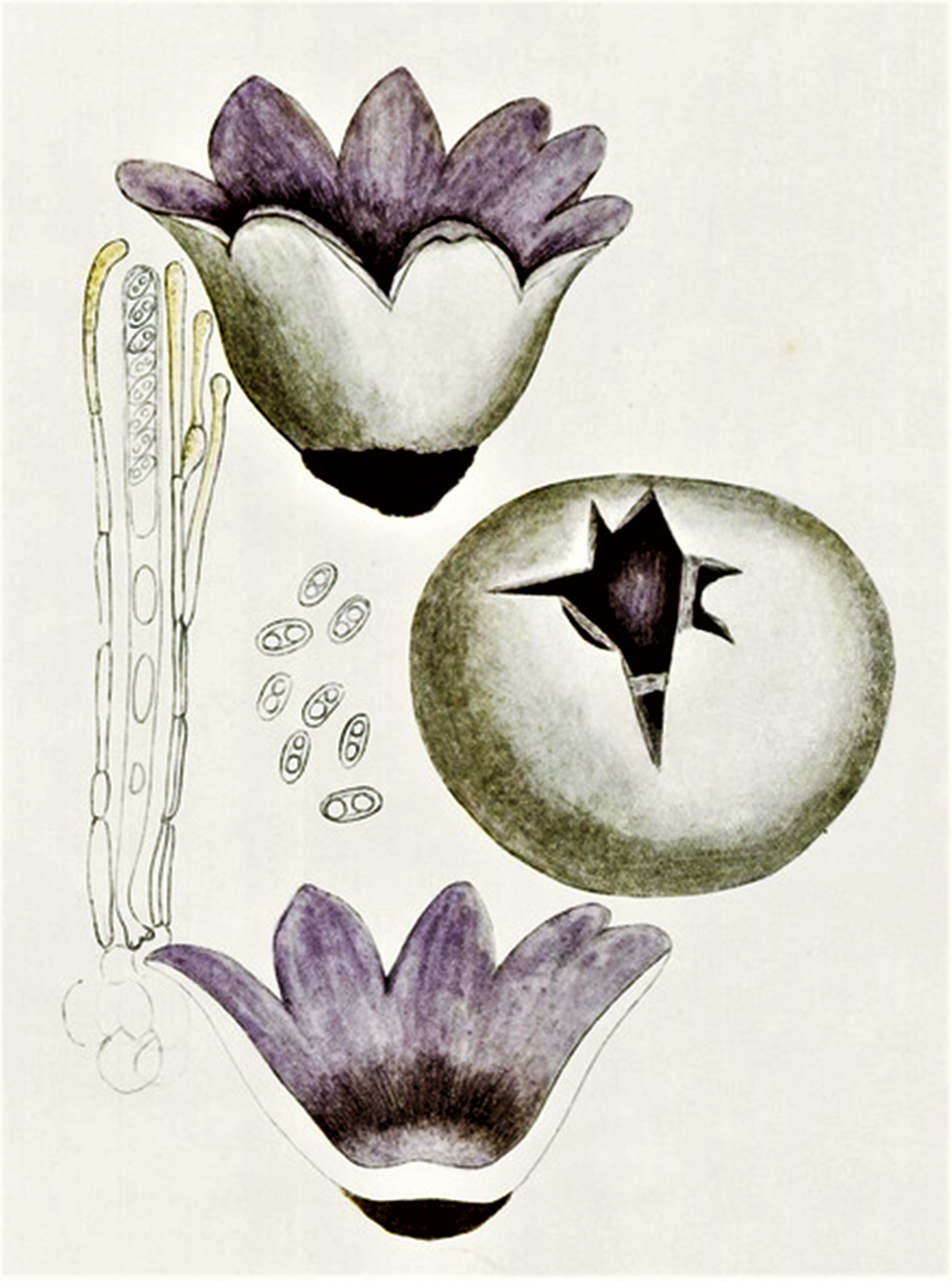 Sarcosphaera coronaria (Jacq., 1778) Boud. (1885), heute (Jacq.) J.Schröt. (1893)